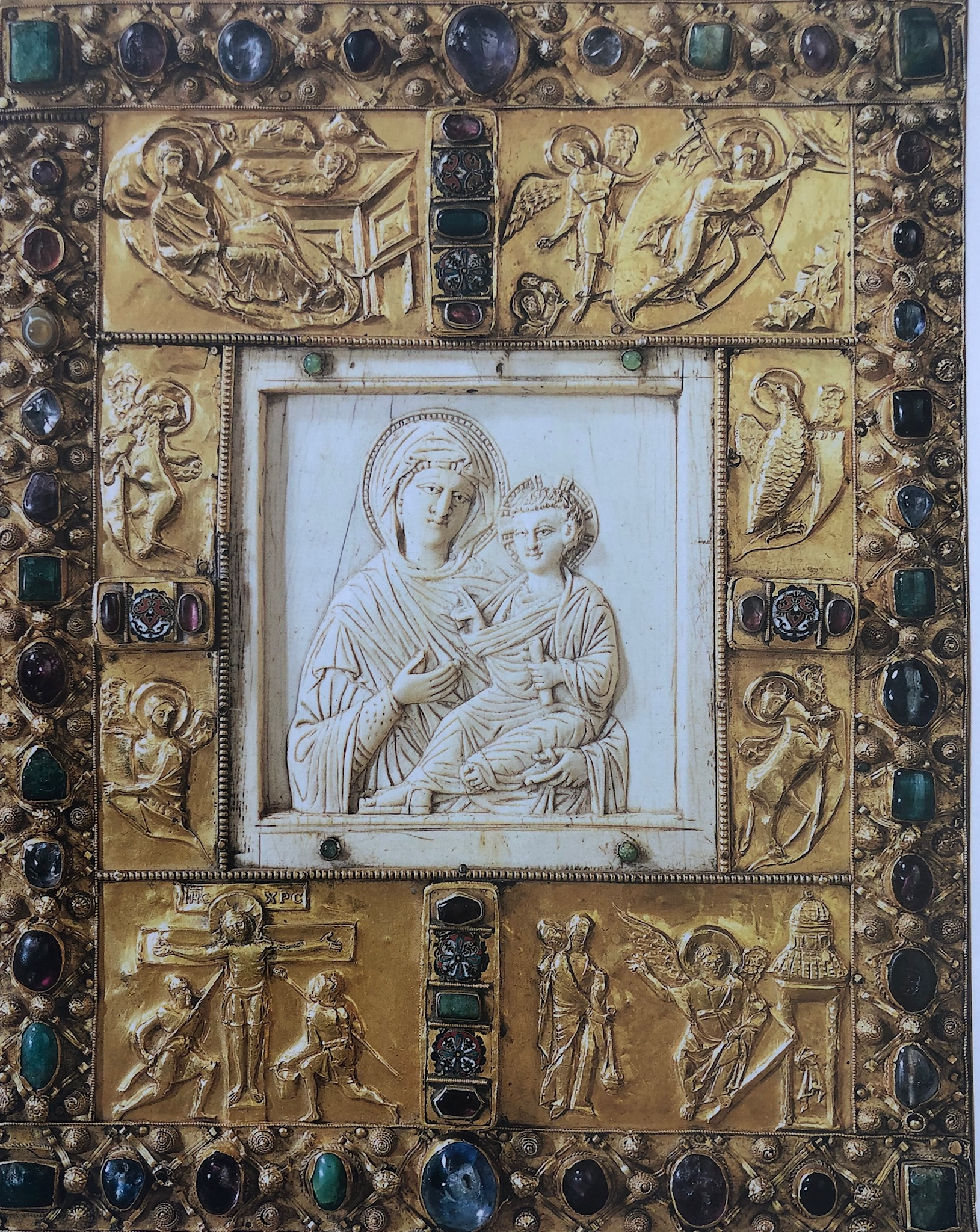 Goldener Buchdeckel mit Edelsteinen und Elfenbeintafel in der Domschatzkammer Aachen